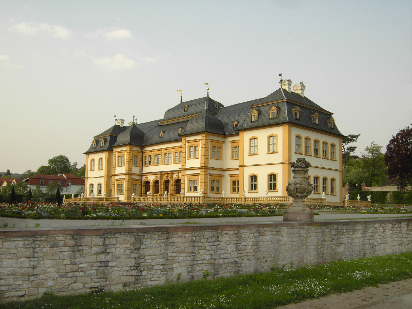 Schloss Veitshoechheim